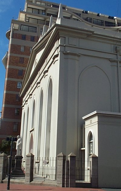 Groote Kerk (Nederduits Gereformeerde Kerk), Cape Town, South Africa